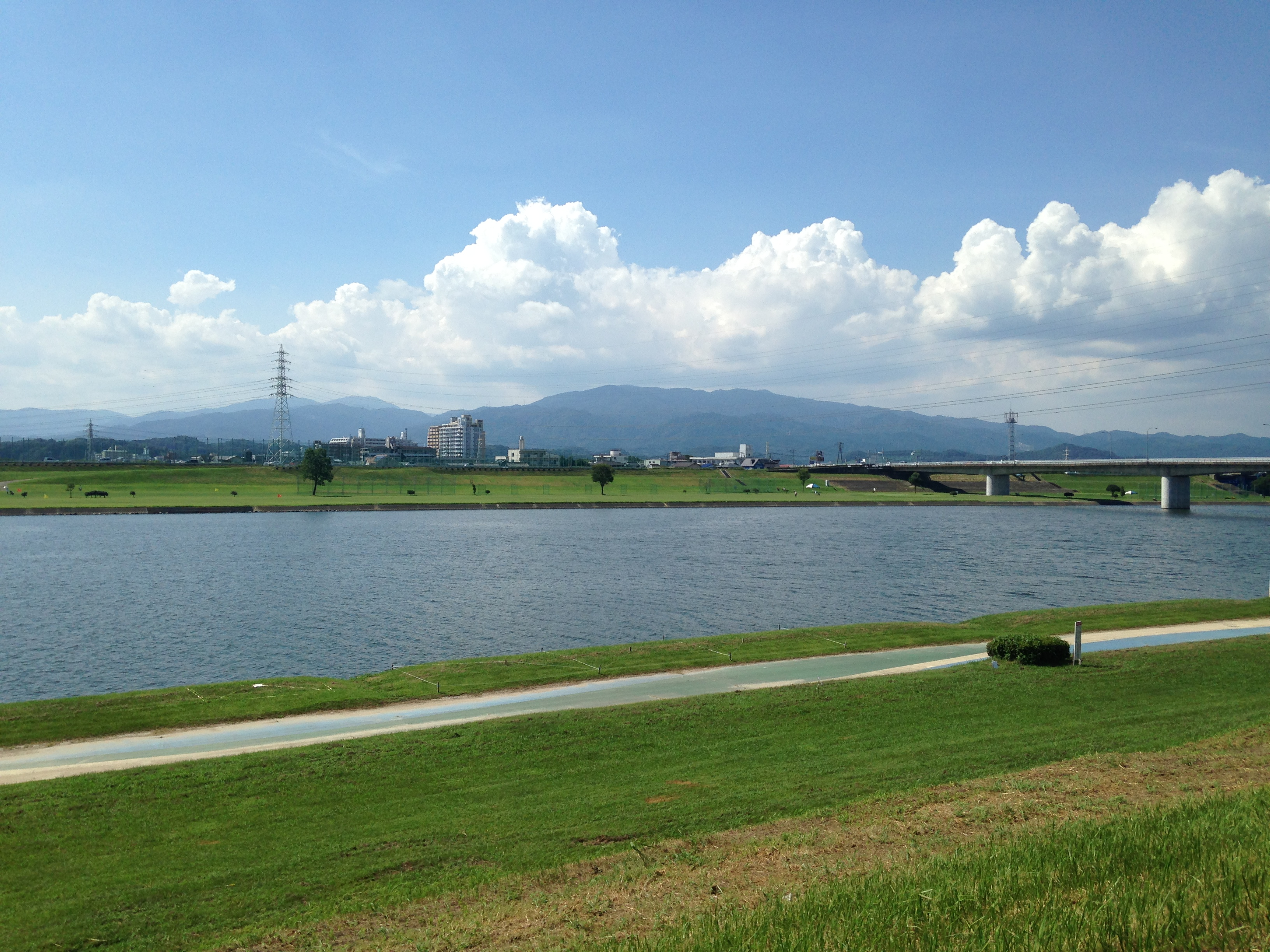 長門石橋付近より望む筑後川と脊振山地